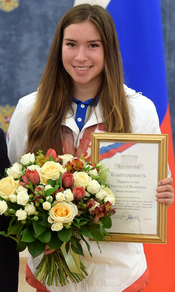 Розалия Насретдинова. Вручение благодарностей Правительства Российской Федерации